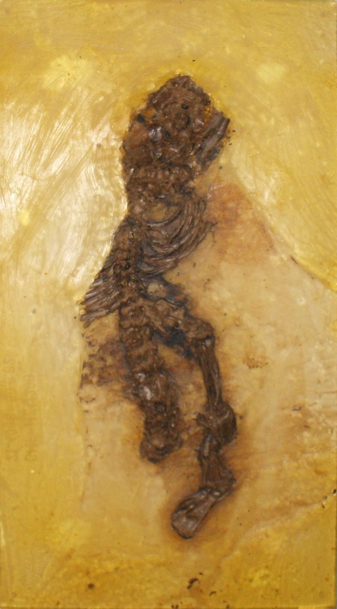 Fossil of Europolemur, an extinct primate- Took the photo at Senckenberg Museum of Frankfurt